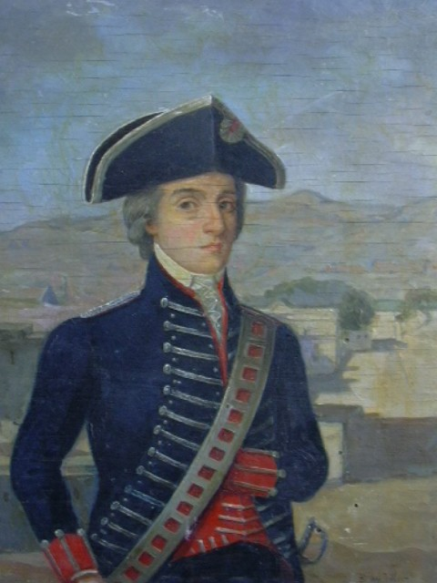 Retrato de Carlos Belgrano (1761-1814). Óleo sobre madera.